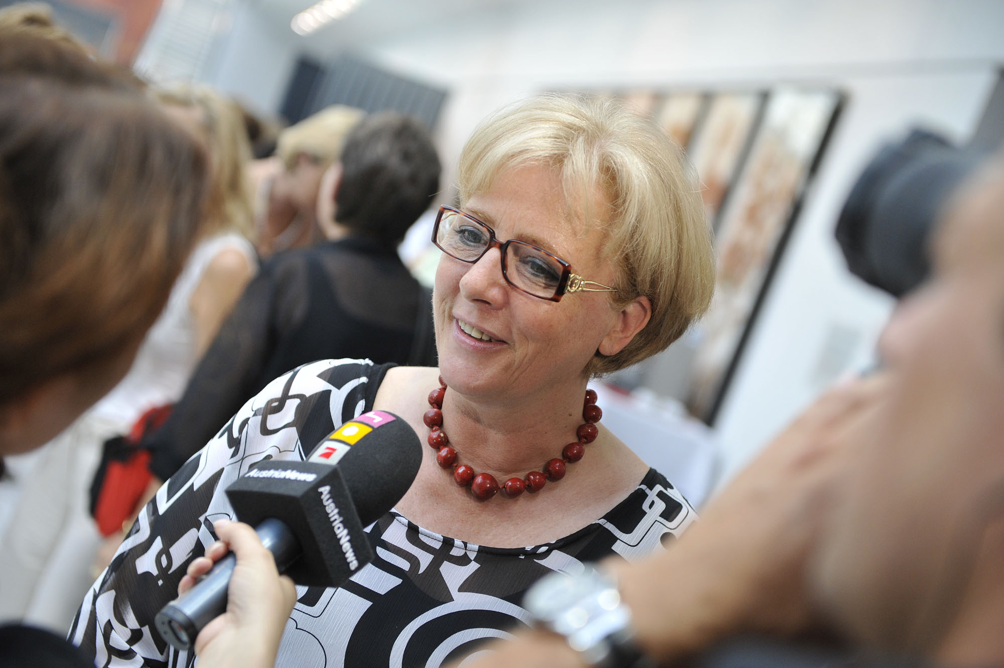 Frauenministerin Heidrun Silhavy beim Interview. Bundesfrauenkonferenz 2008 im Linzer Design-Center.